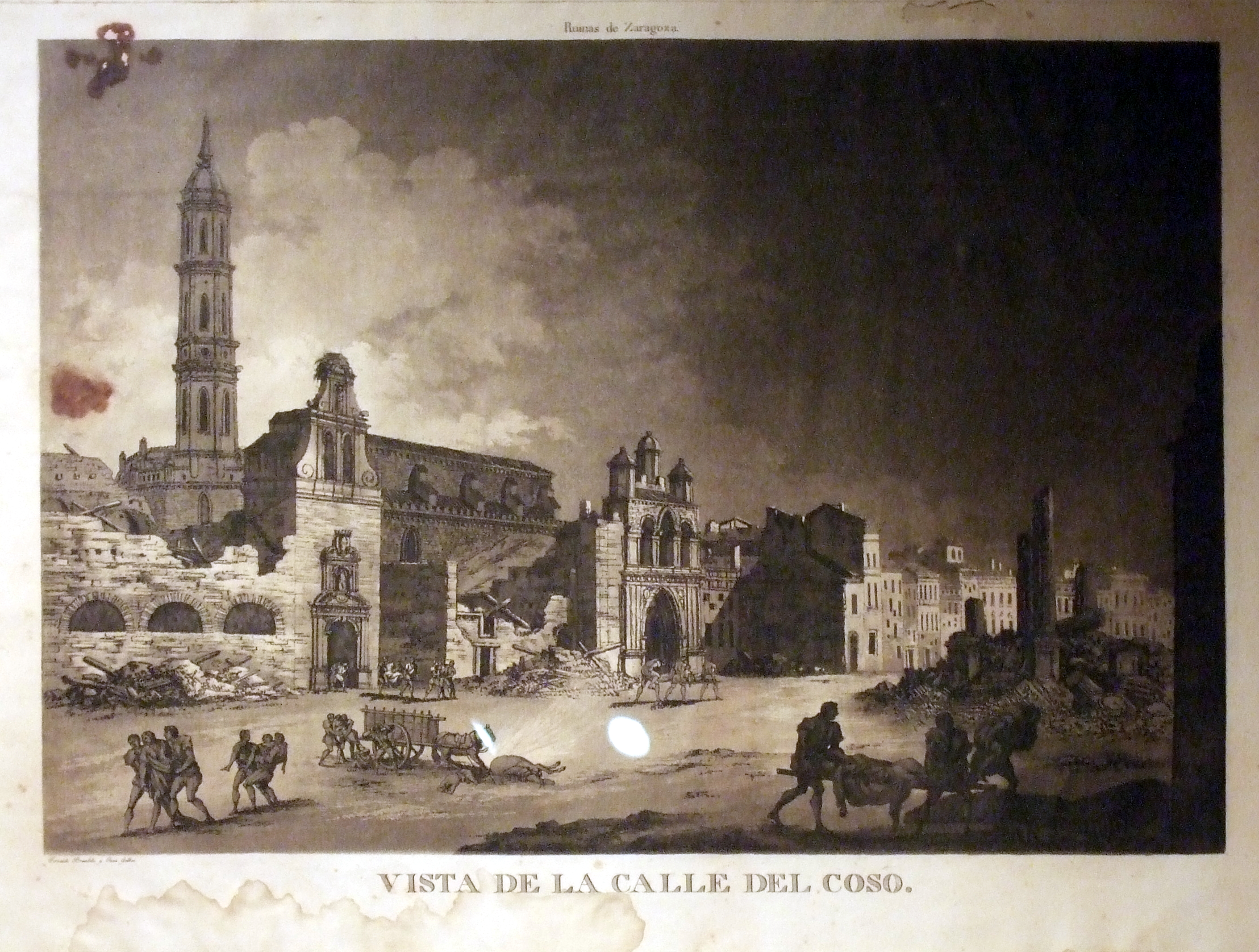 Vista de la calle Coso (1808-1813) Autor: Fernando Brambila y Juan Gálvez